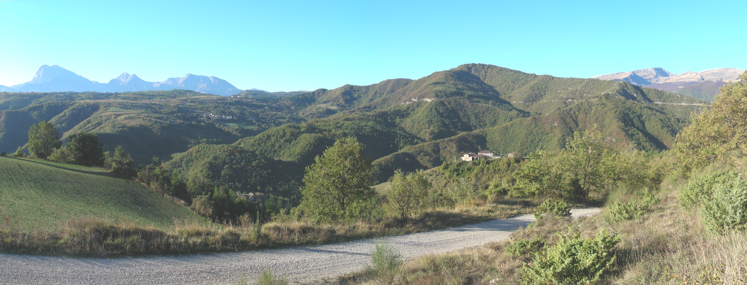 Giustino Di Luigi, Tavolero, licenza 3.0